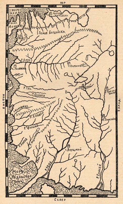 Скан чертежа из издания: Чертежная книга Сибири, составленная тобольским сыном боярским Семеном Ремезовым в 1701 г. - СПБ, 1882